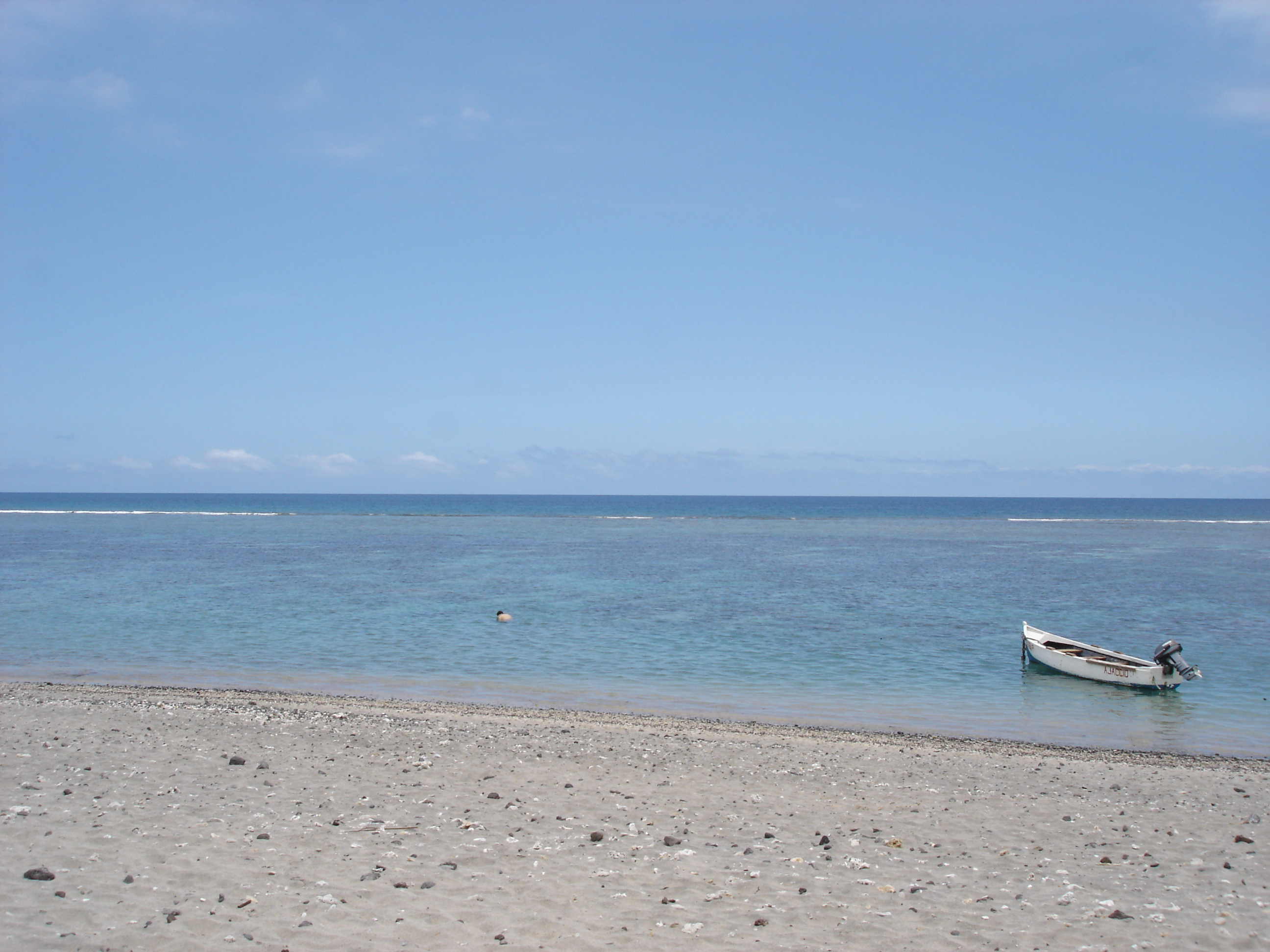 Description: Lagon, novembre 2004, La Réunion Source: Bouba